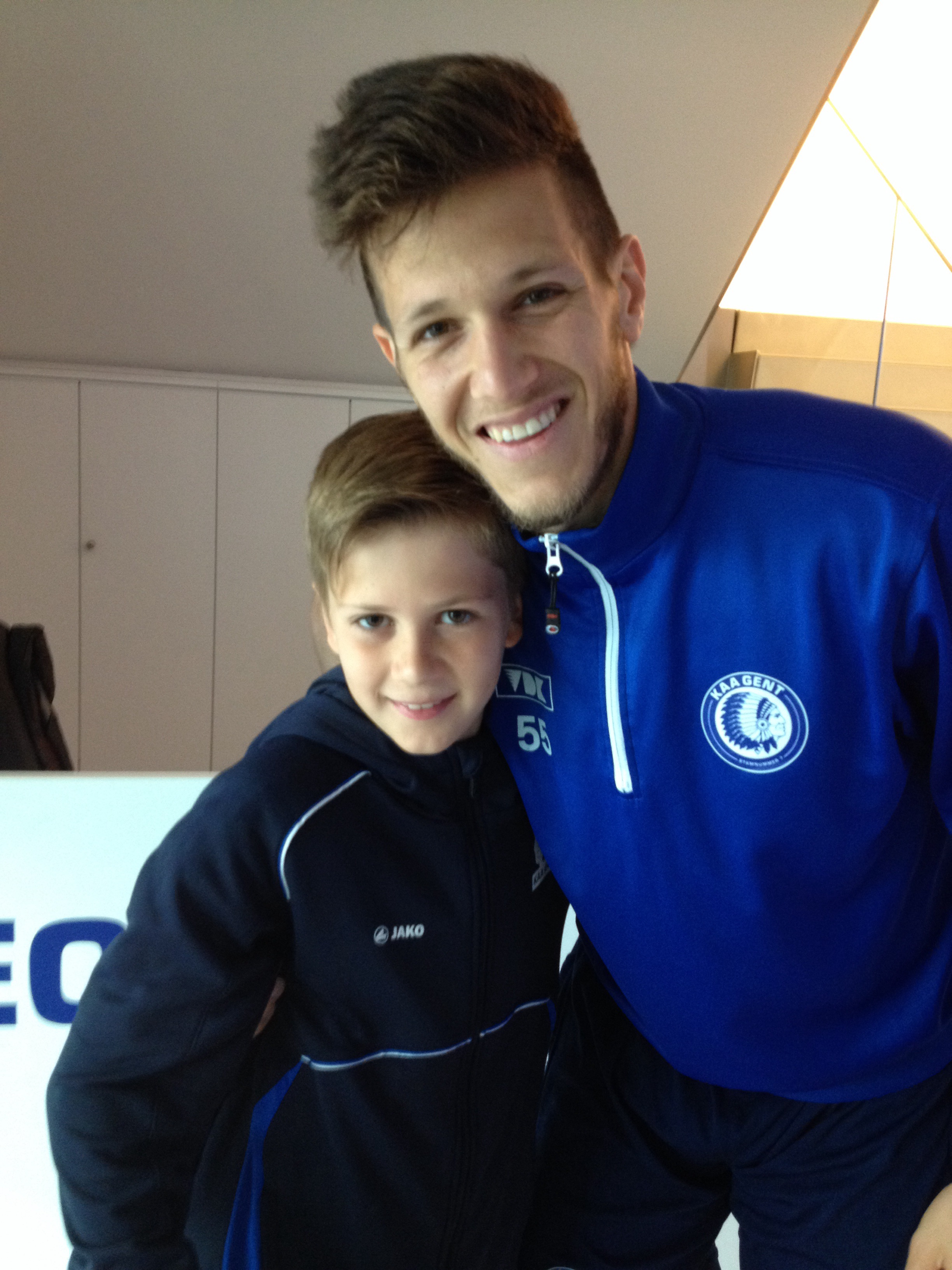 Rami Gershon met fan